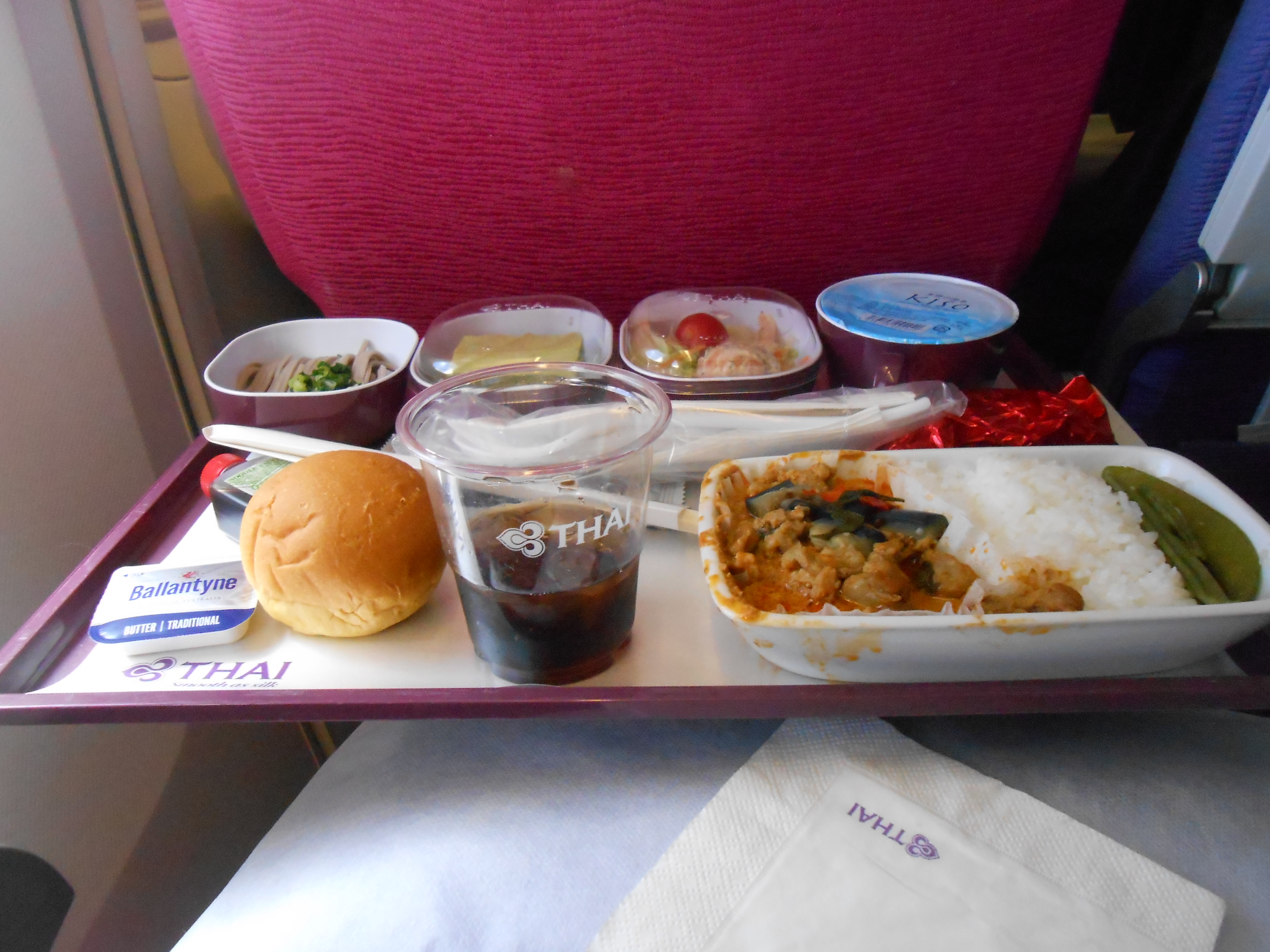 タイ国際航空のエコノミークラスの機内食（TG683）